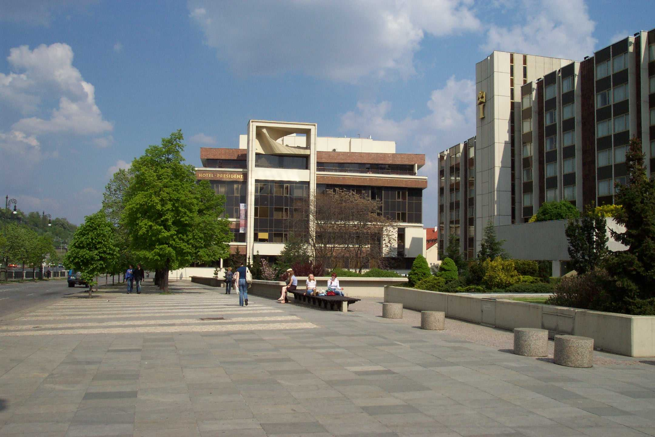 Hotel President, Praha